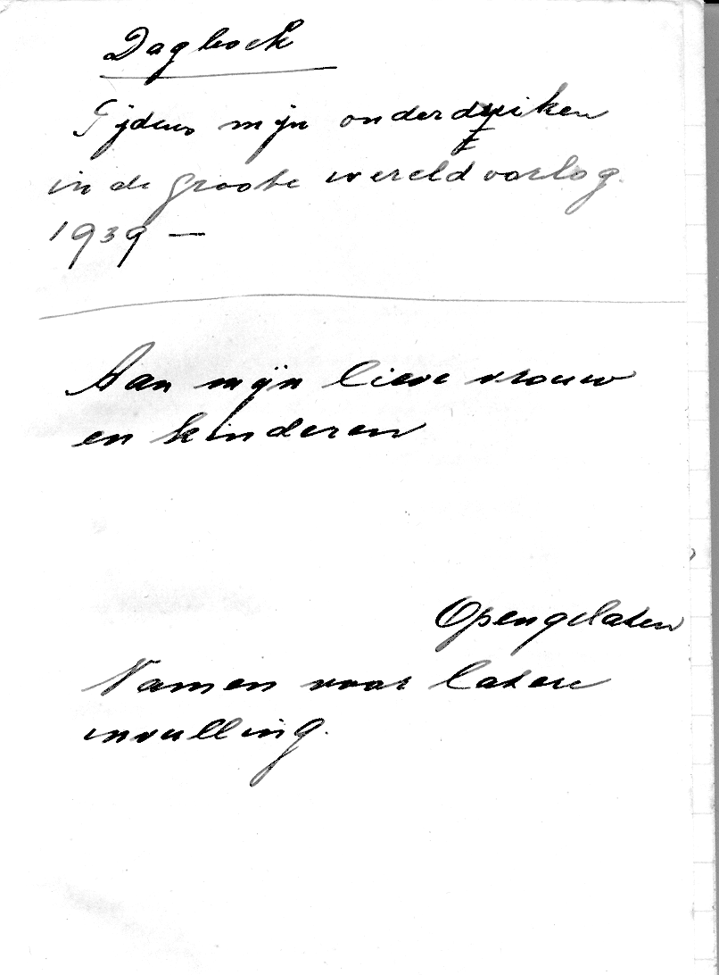 bladzijde 1 uit het dagboekje van P.C. Kroon dat hij bijhield tijdens zijn onderduikingsperiode.